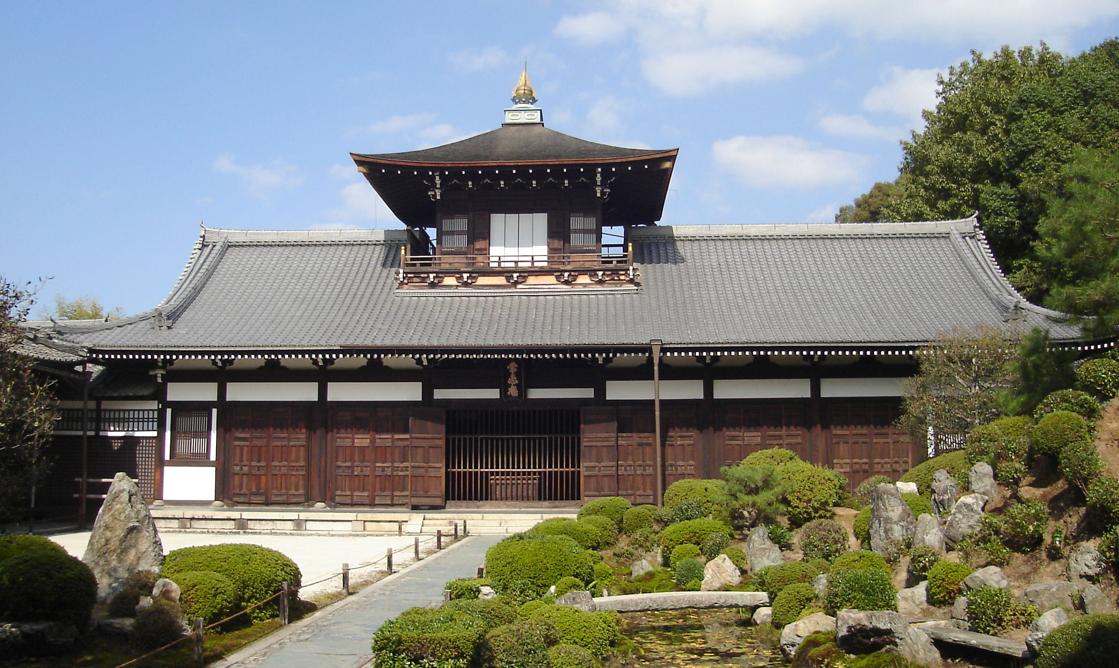 Tofukuji Kaisando (東福寺 開山堂)